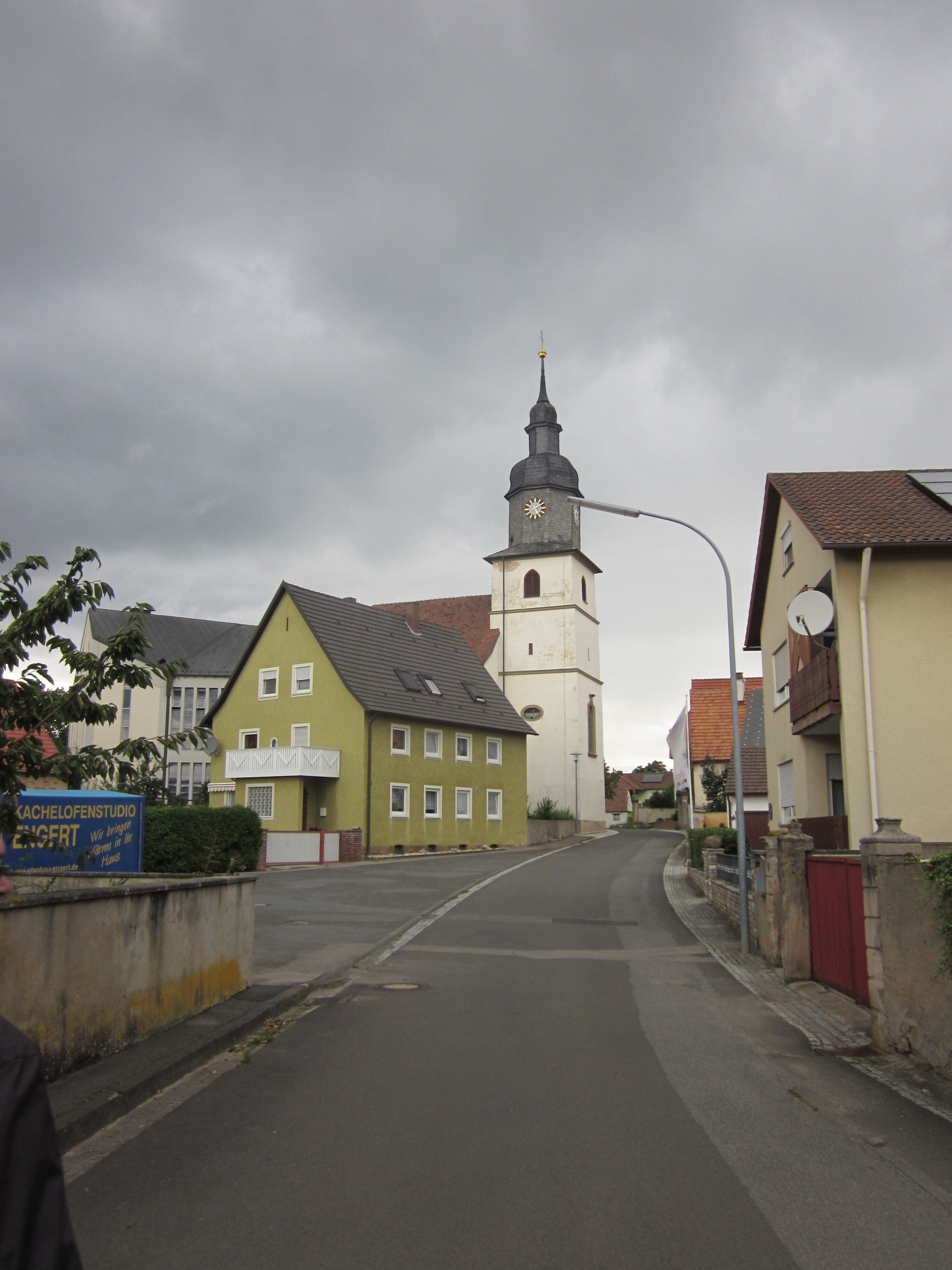 Die Alitzheimer Kirche von der Kirchgasse ausgesehen.